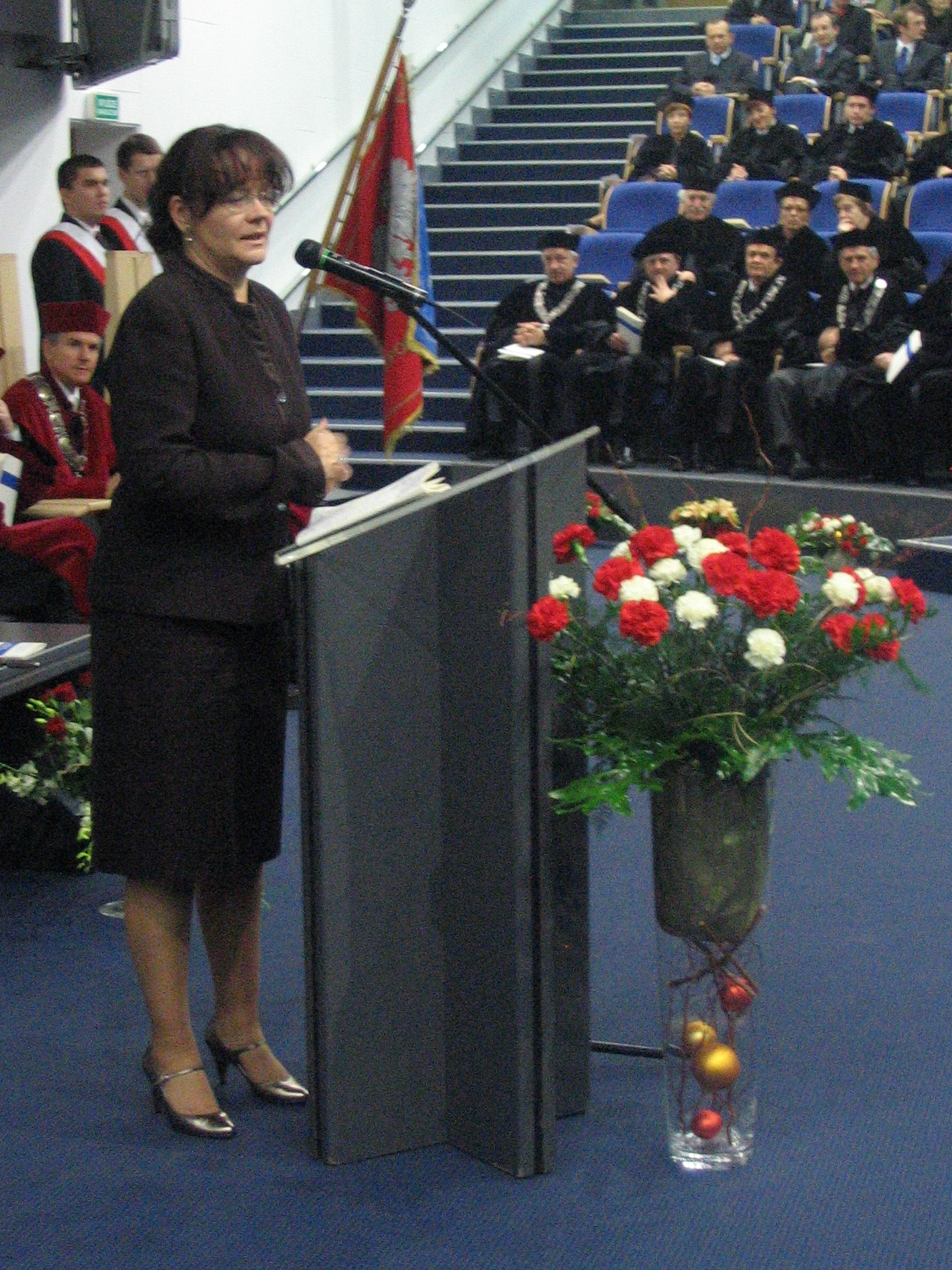 Barbara Kudrycka na uroczystości przyznania Doktoratu Honoris Causa Jerzemu Buzkowi w Gliwicach